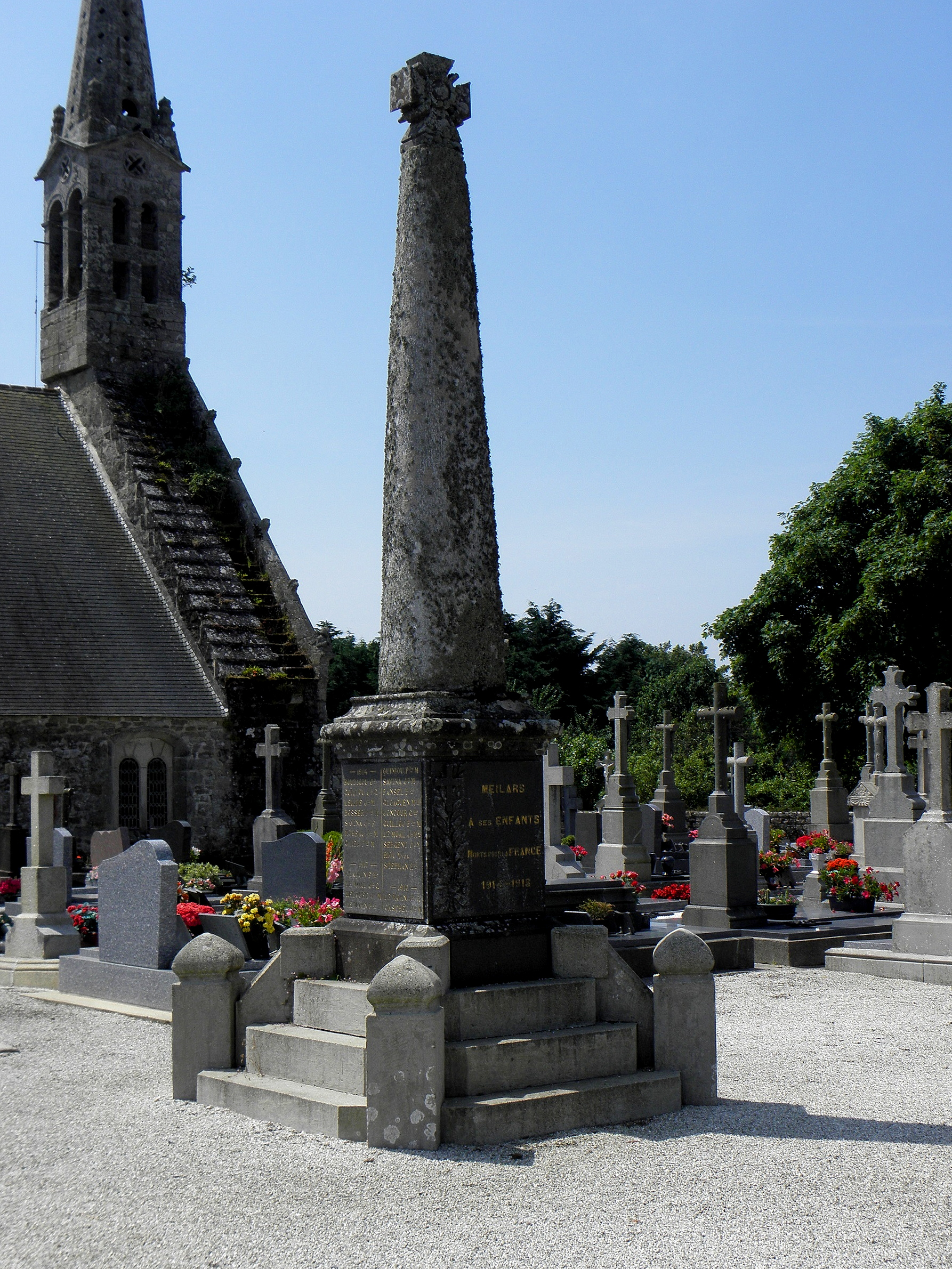 Église Saint-Mélar de Confort-Meilars (29). Clocher et Monument aux morts.